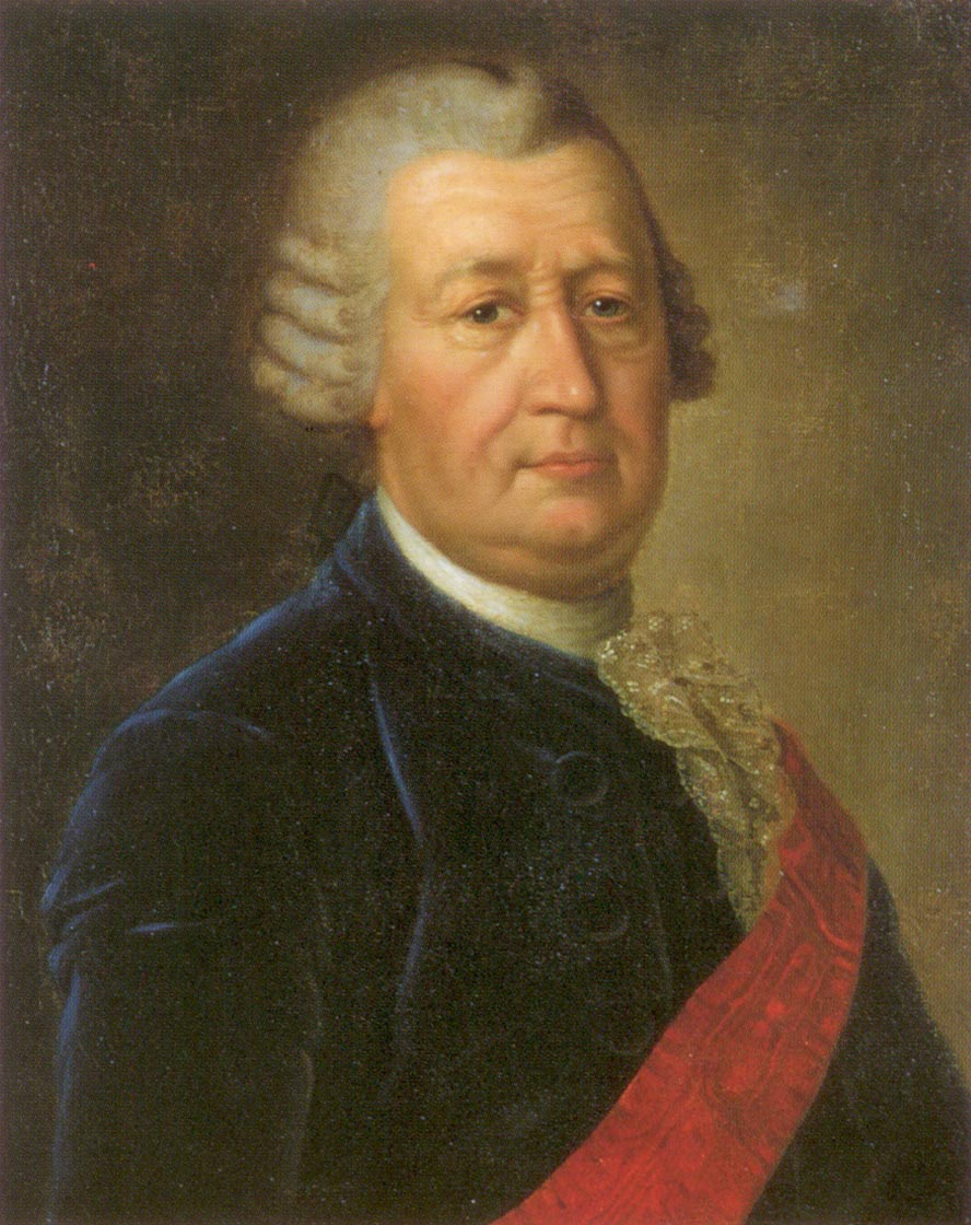 Фёдор Иванович Соймонов (1692-1780), действительный тайный советник, вице-адмирал, сенатор, известный гидрограф и картограф, сослан в Сибирь по делу А. П. Волынского. Отец Михаила Фёдоровича Соймонова (15 мая 1730, Москва — 17 октября 1804, Москва).